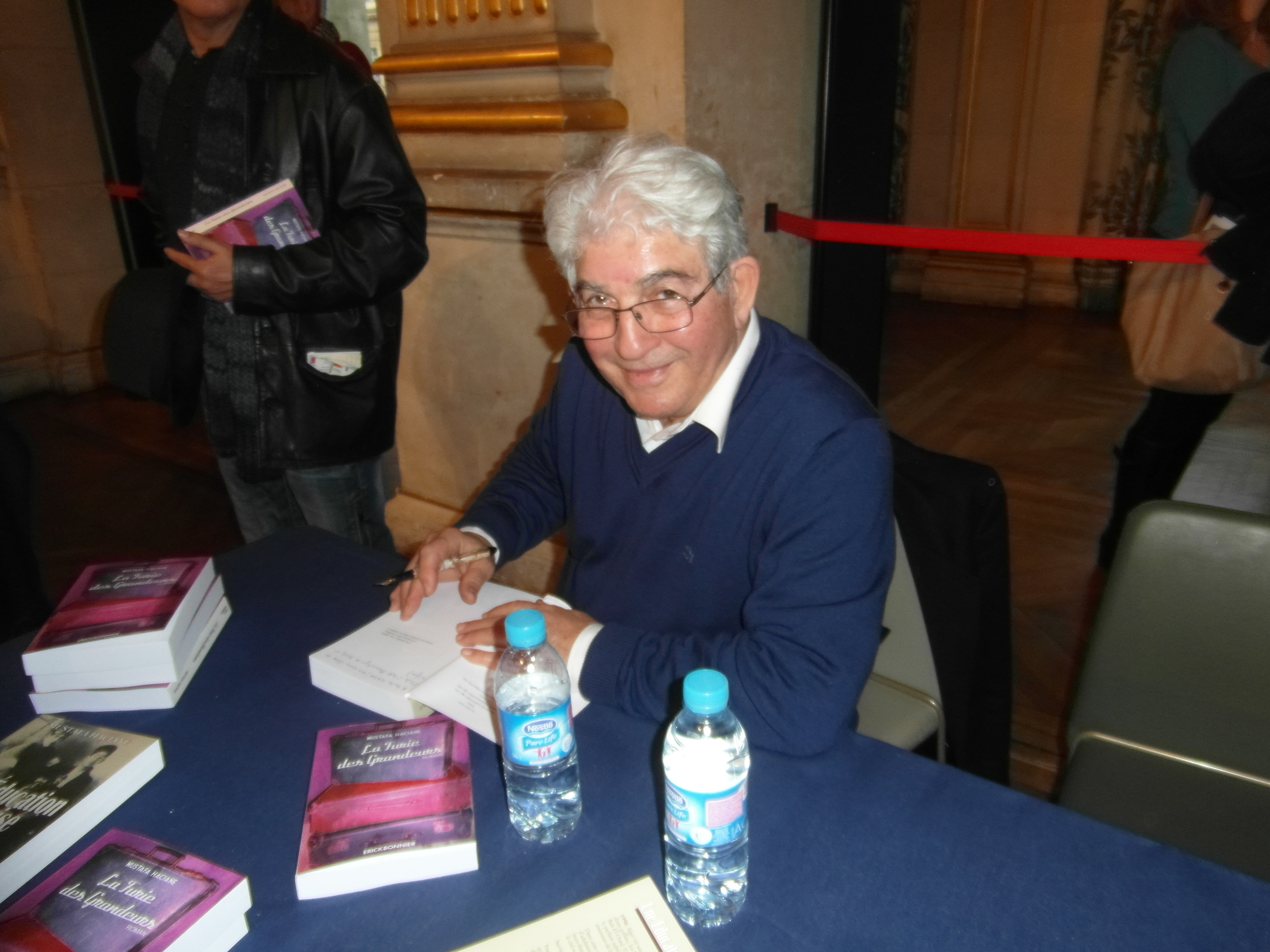 Maghreb des Livres, 7 et 8 février 2015